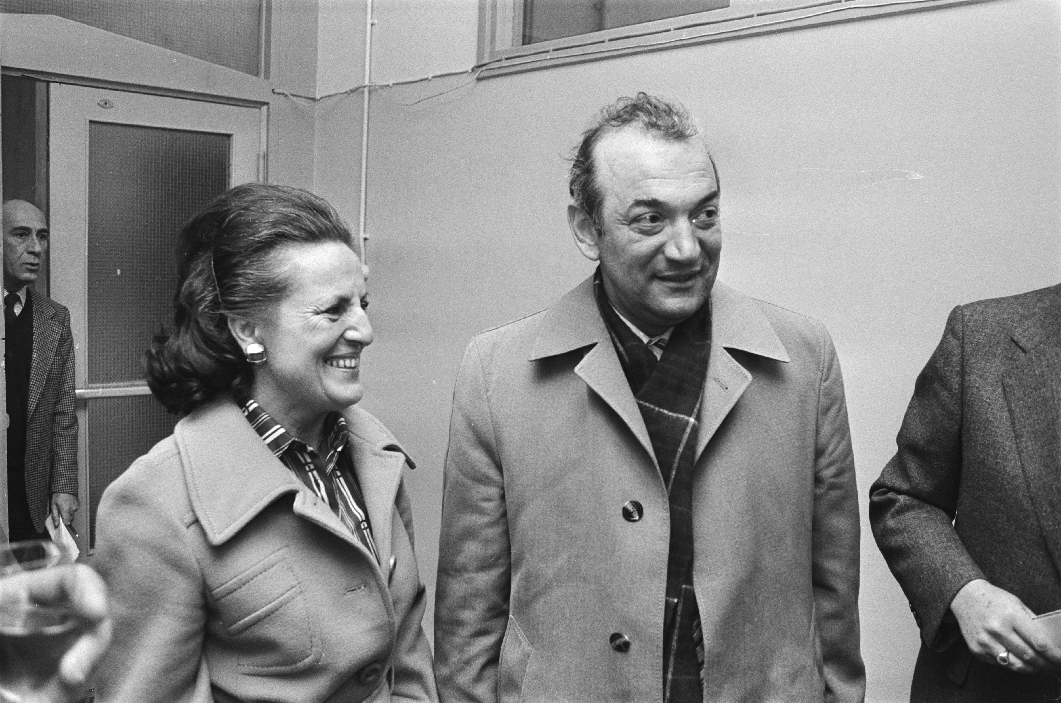 Collectie / Archief : Fotocollectie Anefo Reportage / Serie : [ onbekend ] Beschrijving : Max Euwe (Fide) maakt aangeboden plaatsen bekend voor WK-tweekamp Kortsjnoj tegen Karpov; Kortsjnoj met zijn secretaresse Datum : 16 februari 1978 Trefwoorden : aanbiedingen, schaken, secretaresses Persoonsnaam : Euwe, Max, Kortsjnoi, Viktor Fotograaf : Bogaerts, Rob / Anefo Auteursrechthebbende : Nationaal Archief Materiaalsoort : Negatief (zwart/wit) Nummer archiefinventaris : bekijk toegang 2.24.01.05 Bestanddeelnummer : 929-5768